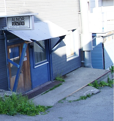 Mosquée ALNOR de Tromsoe en Norvège Ahmed Hanifi- Mardi 26 juillet 2016